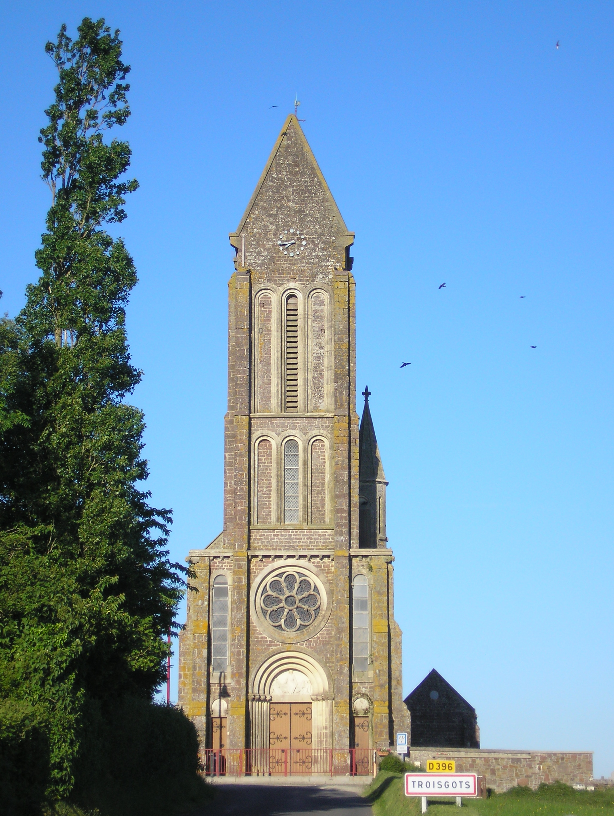 Troisgots (Normandie, France). L'église Saint-Lô.